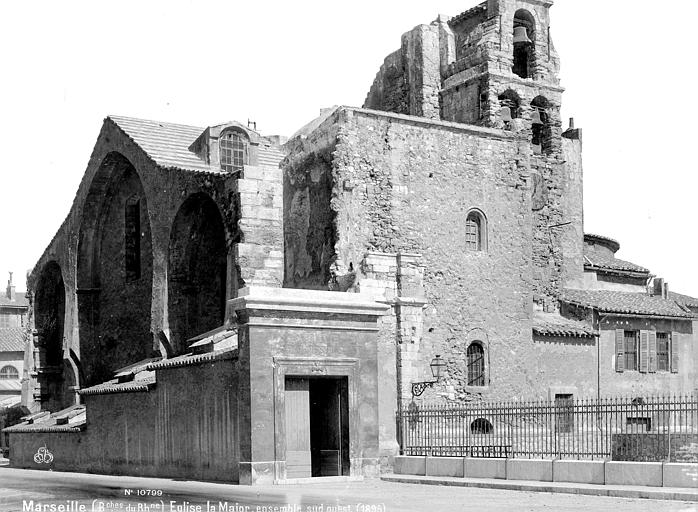 Vue d'ensemble de l'église de la vieille Major de Marseille par Séraphin-Médéric Mieusement.